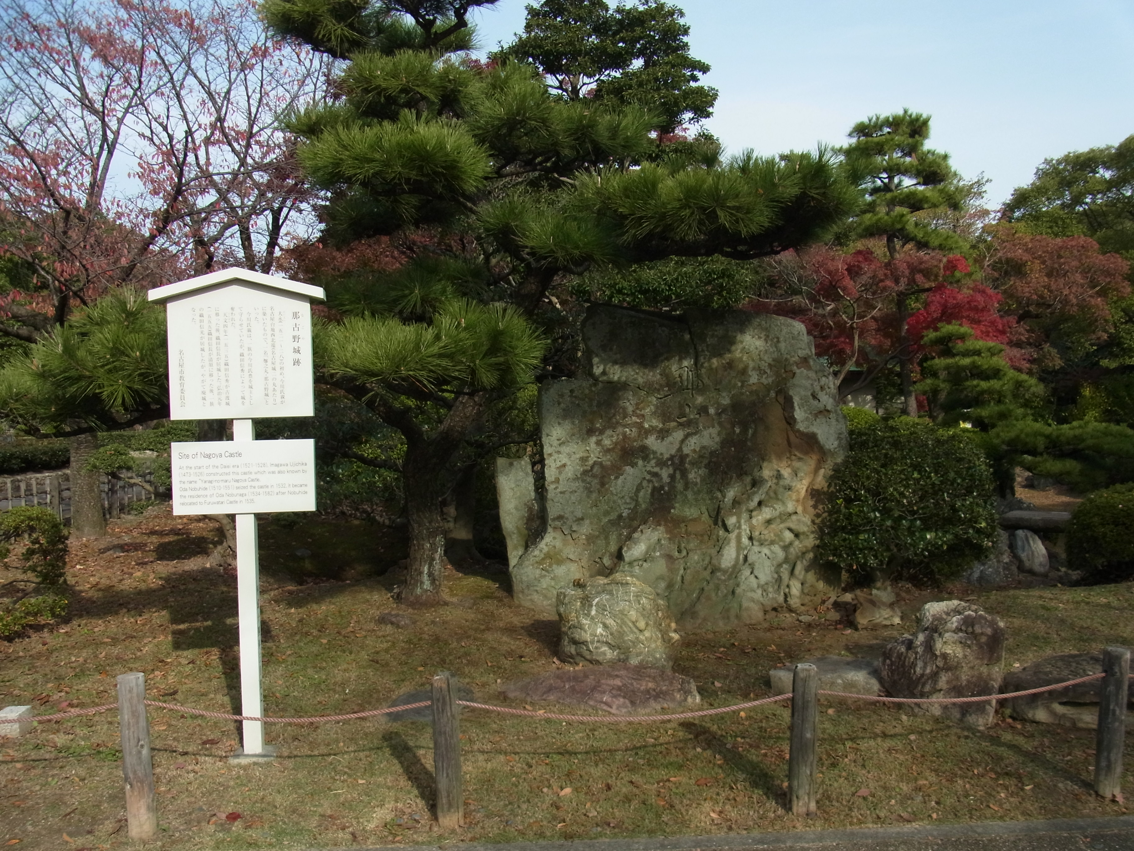 那古野城跡